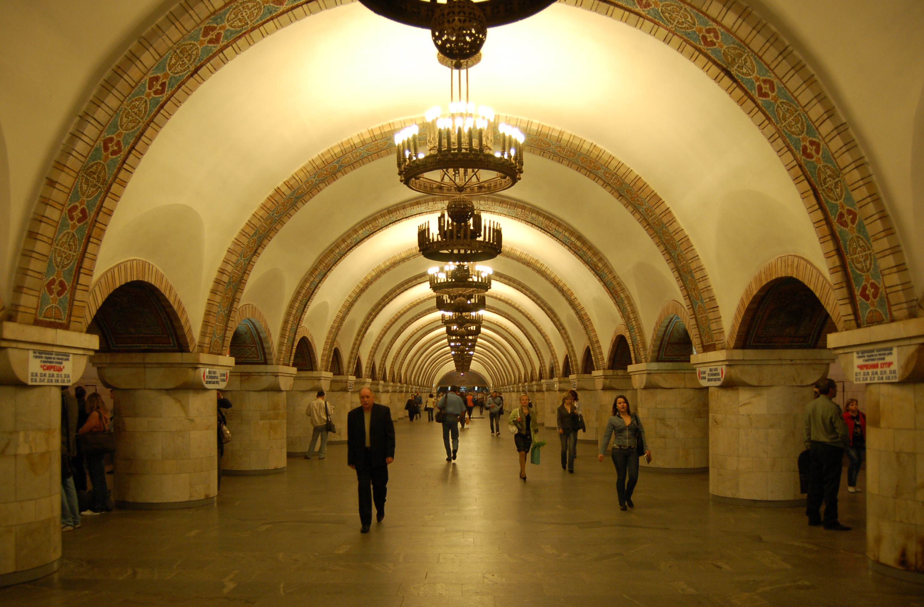 Cтанция метро «Золотые ворота», центральный зал